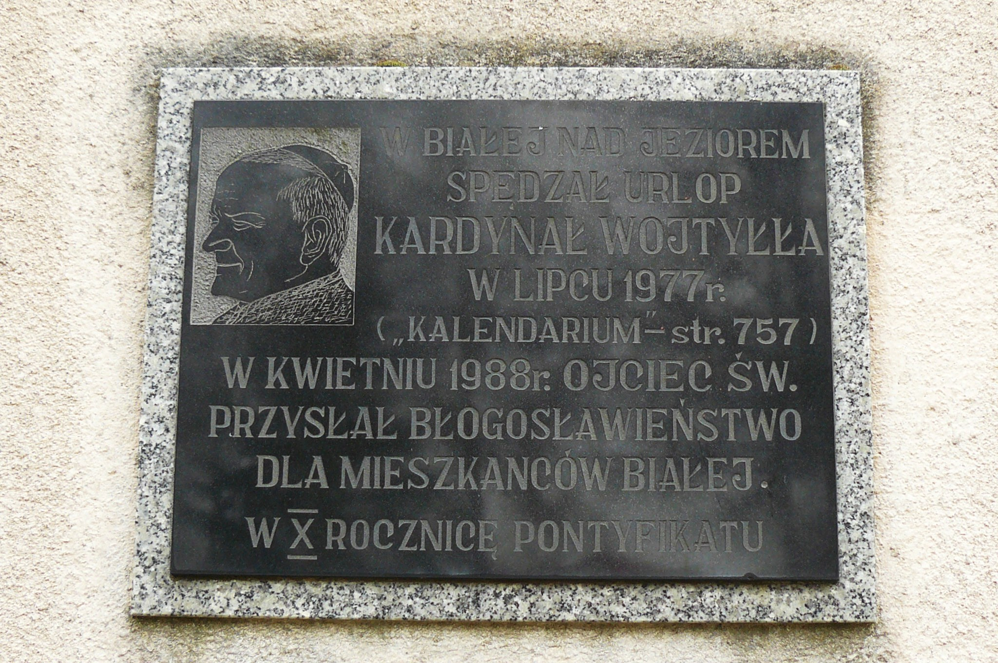 Biała - rzymskokatolicki kościół filialny pw. Matki Boskiej Różańcowej (1928-1932)